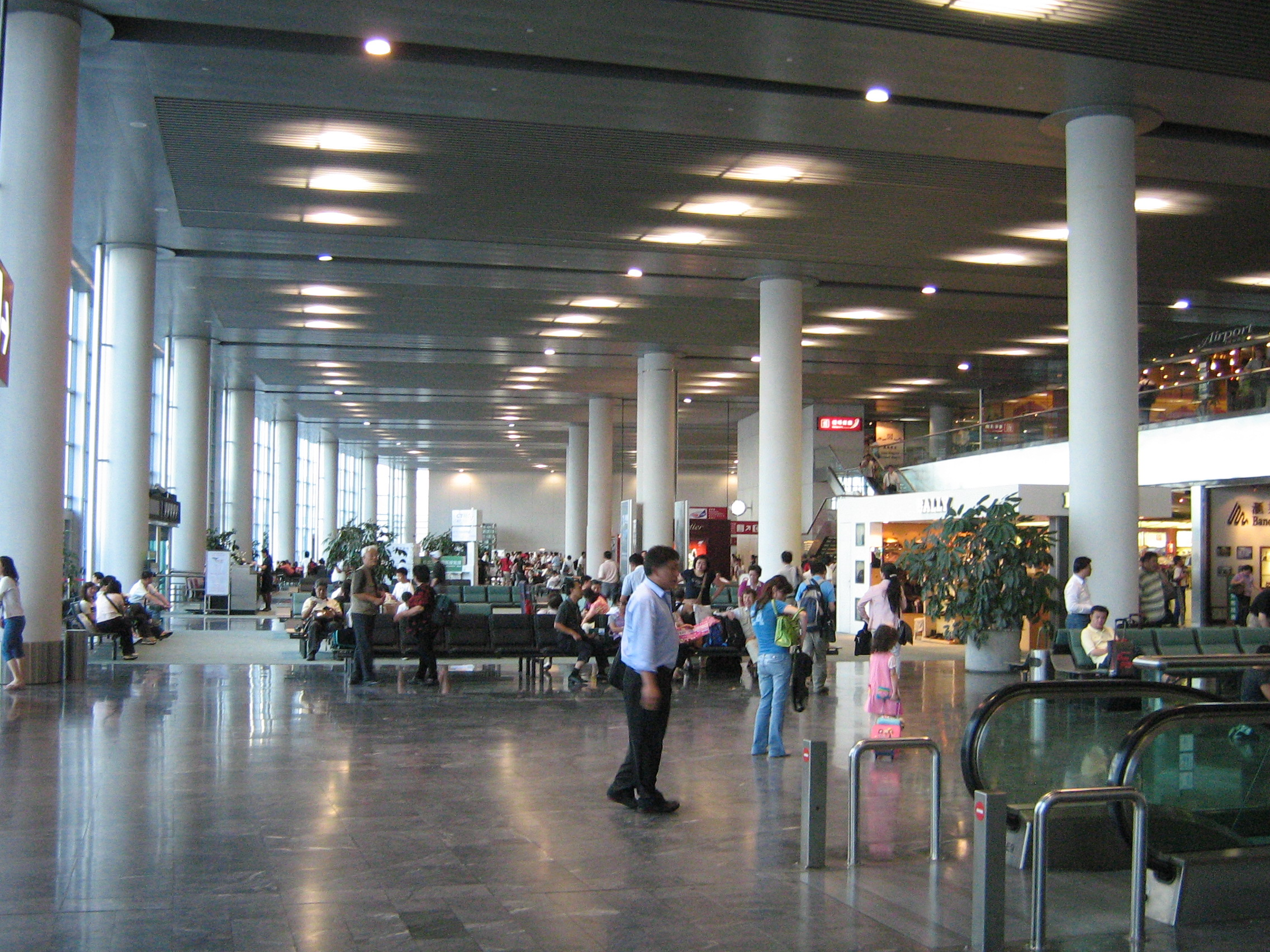 macao airport terminal